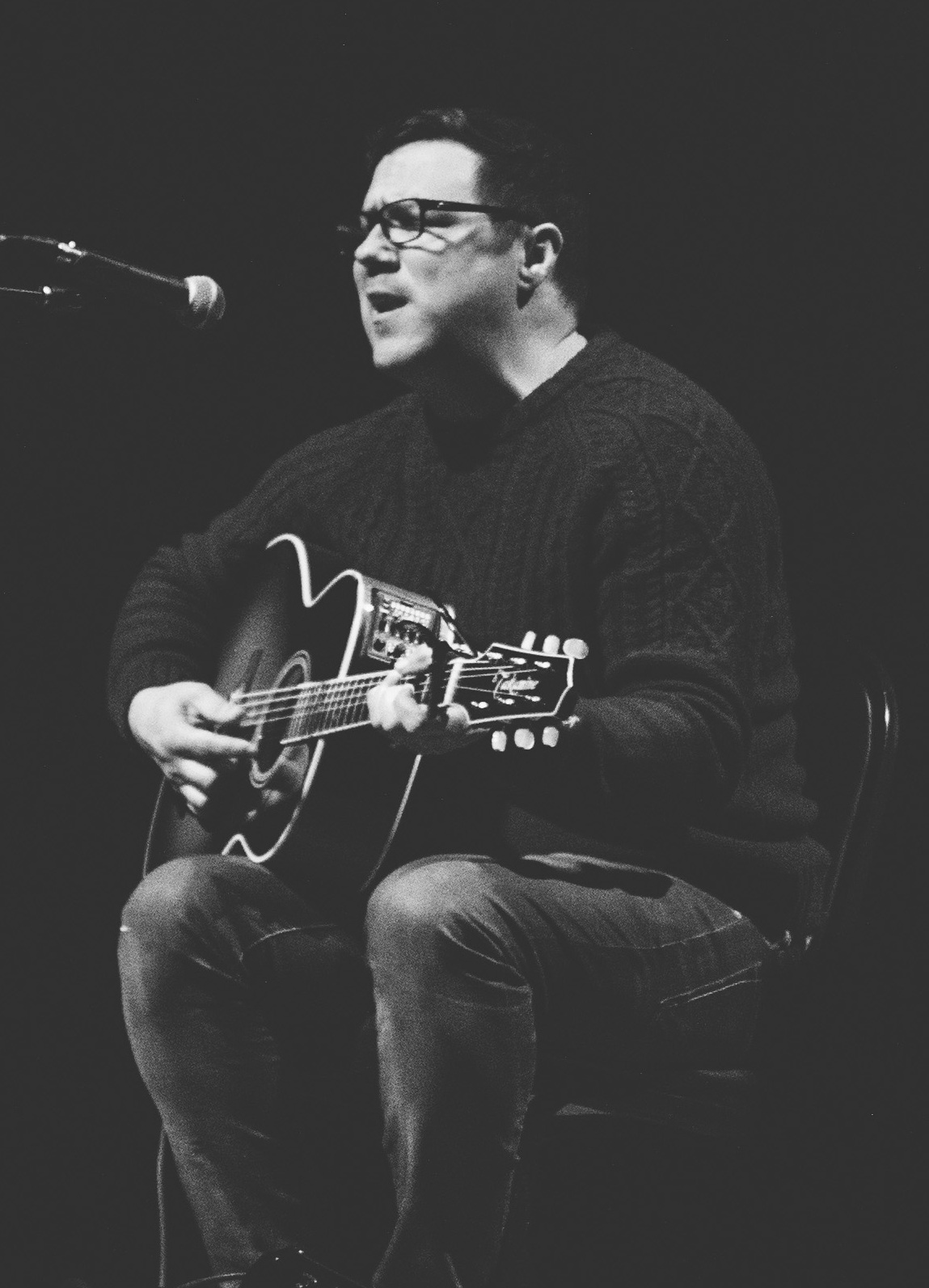 Damien_Jurado-6